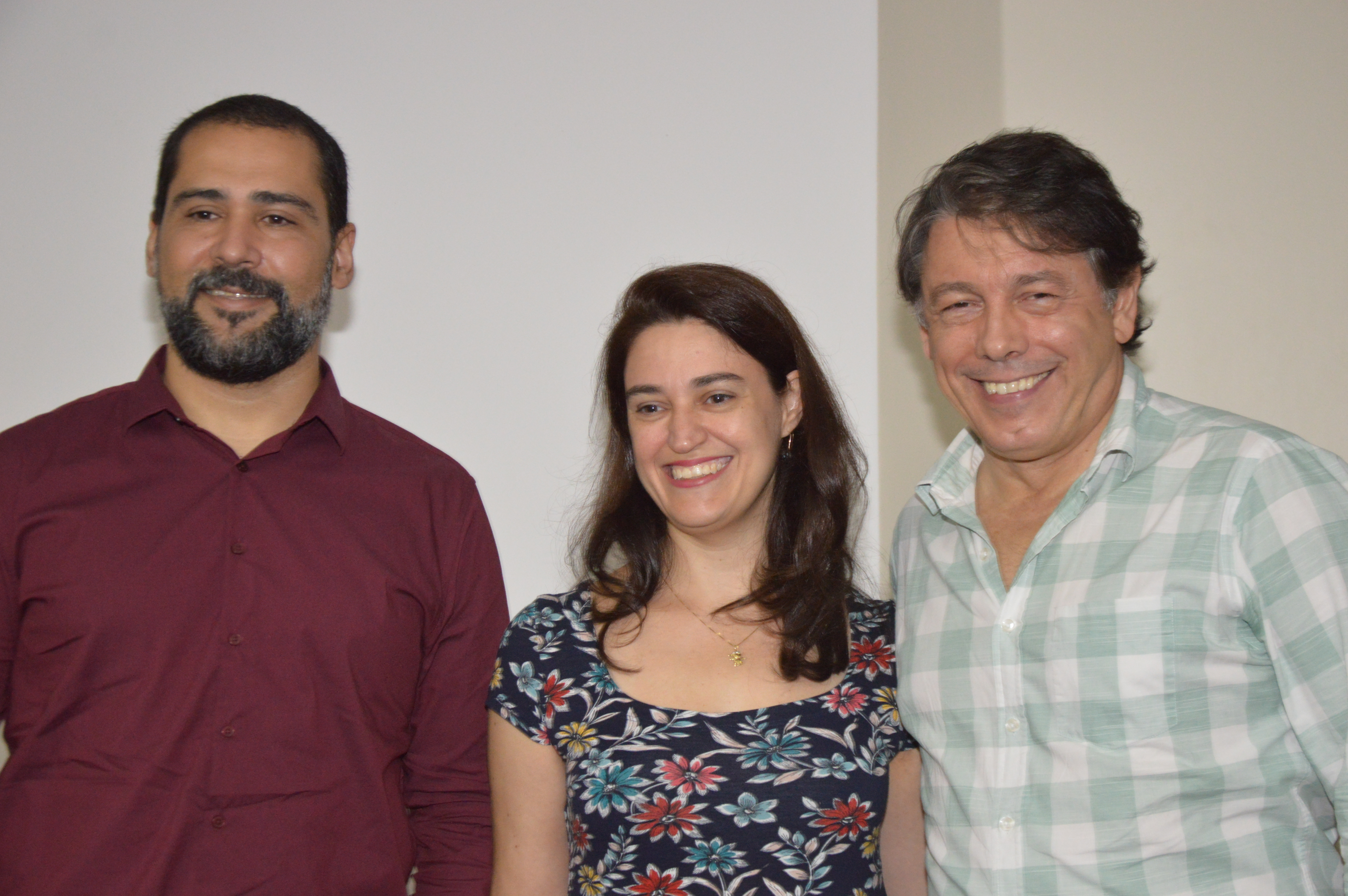 Marcelo Viana na Aula Magna IME-UFRGS dia 25 de abril de 2018. Com o diretor do Instituto, Dr. Elismar da Rosa Oliveira e Dra. Flávia Malta Branco